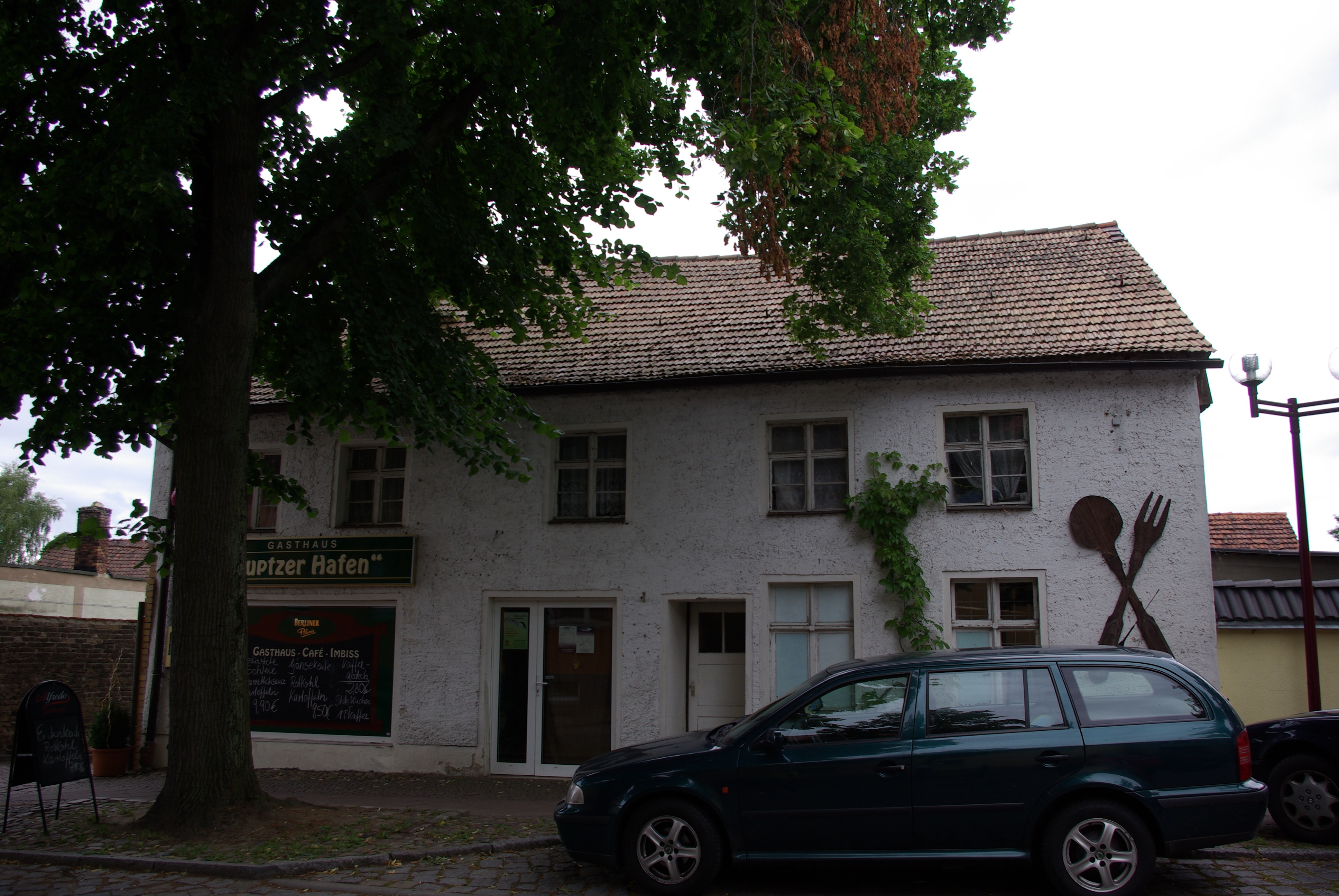 Teupitz in Brandenburg. Das Haus Markt 16 steht unter Denkmalschutz.